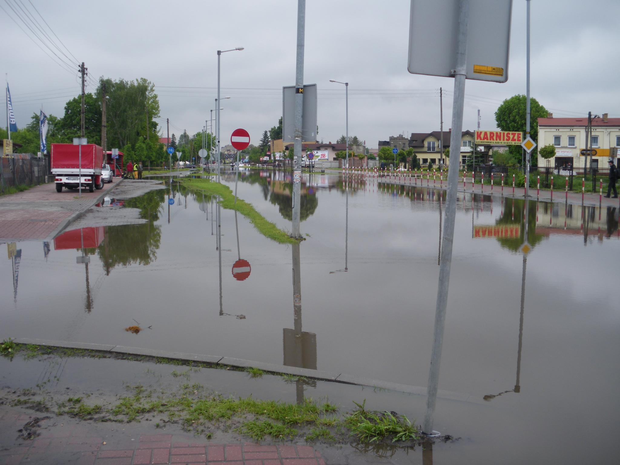 Zalana ul. Faradaya w dzielnicy Zawodzie w Częstochowie.